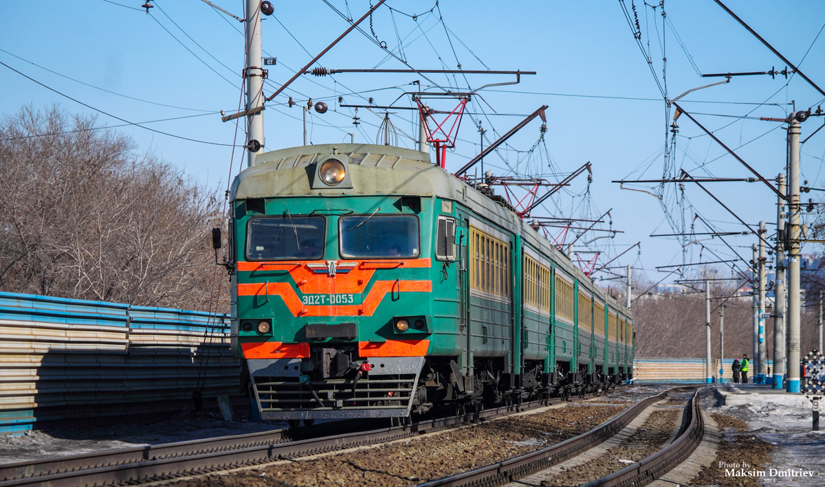 Электропоезд построен в десятивагонной составности в сентябре 1998 года. С завода поступил в депо Новосибирск Западно-Сибирской ж.д.. В сентябре 2003 года вагон 04 был переделан в мотрису СВ-3Н. Вагон 03 в то же время был разобран. Вагоны 02, 03, 05, 06 не эксплуатируются с 2005 года. Вместо них закреплены вагоны ЭД4М-001602, 03, 05, 08, 10.